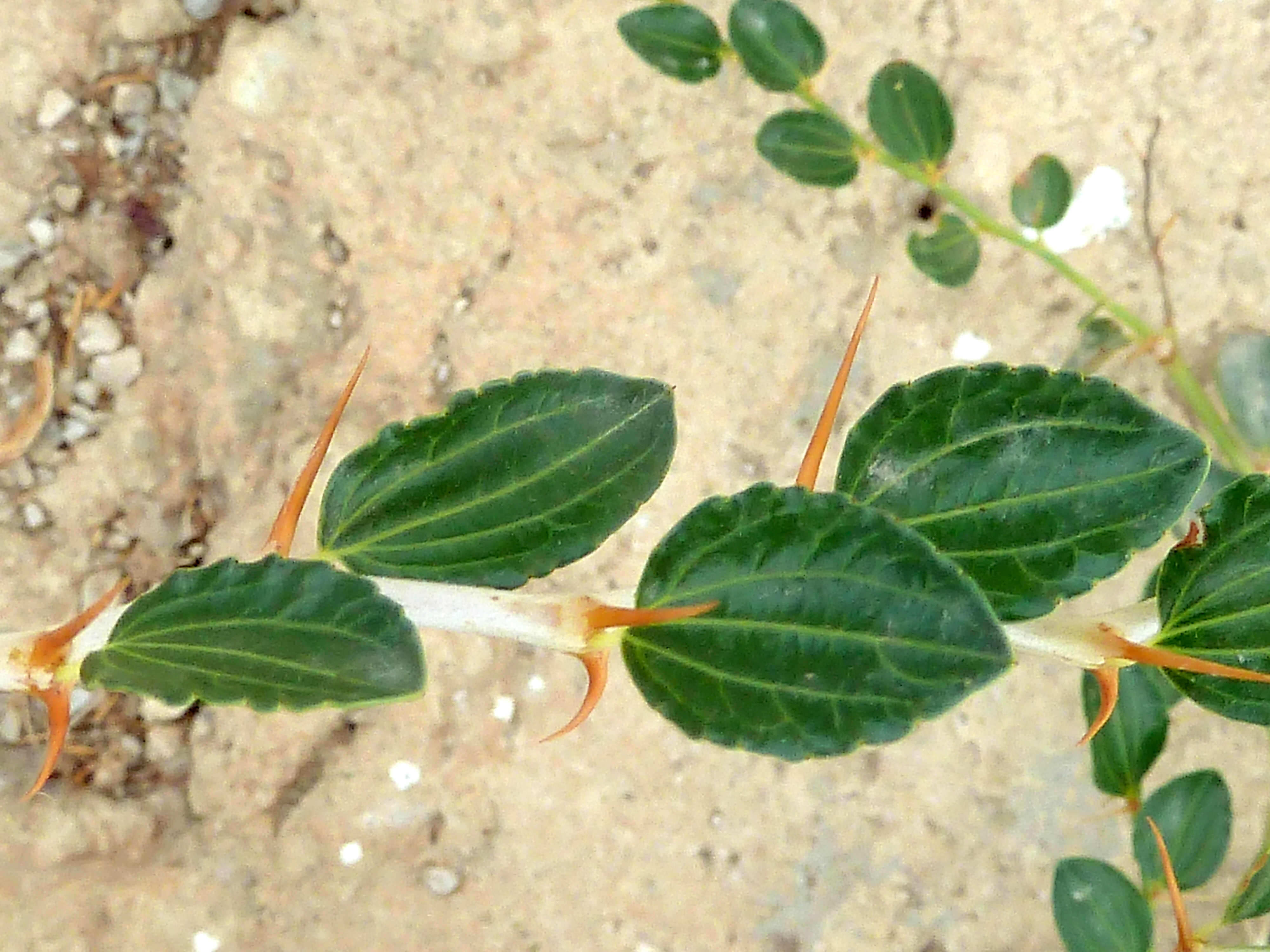 Ziziphus jujuba (Jinjolero, azufaifo) - Hojas de una rama muy joven; espinas nodal/axilares - Avda de La Libertad, Albatera (Provincia de Alicante, España).